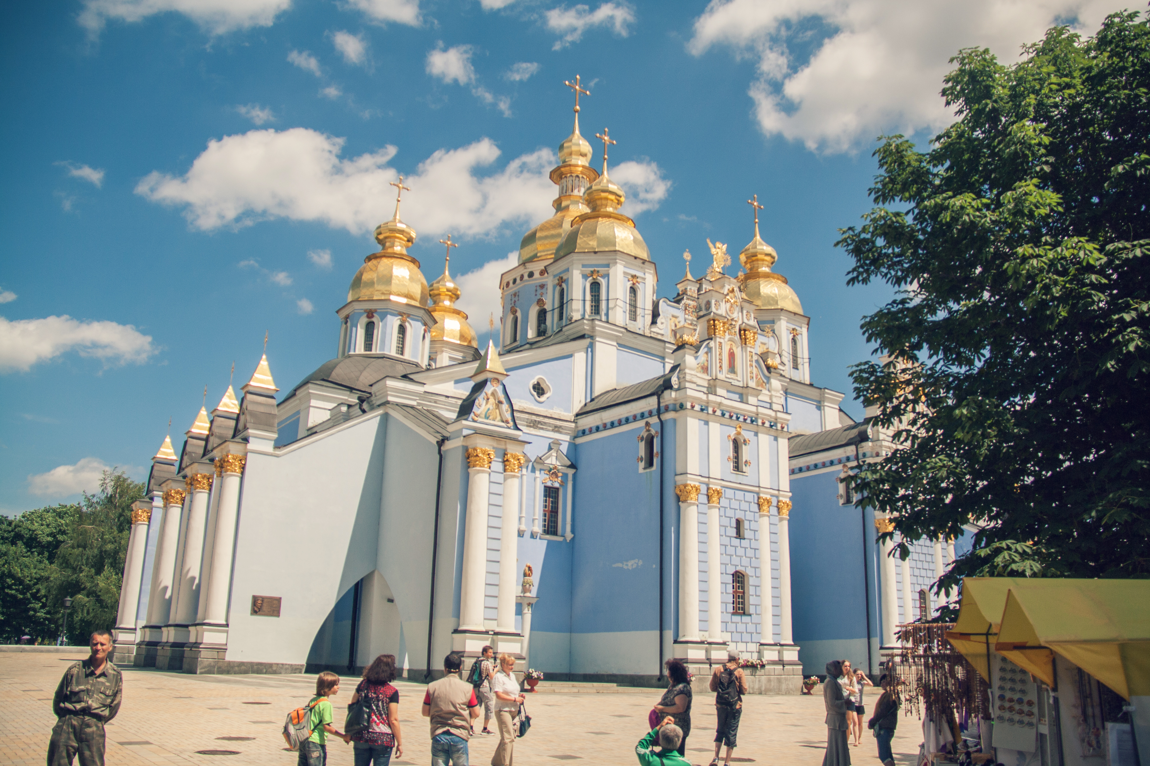 Kiev, Ucrania